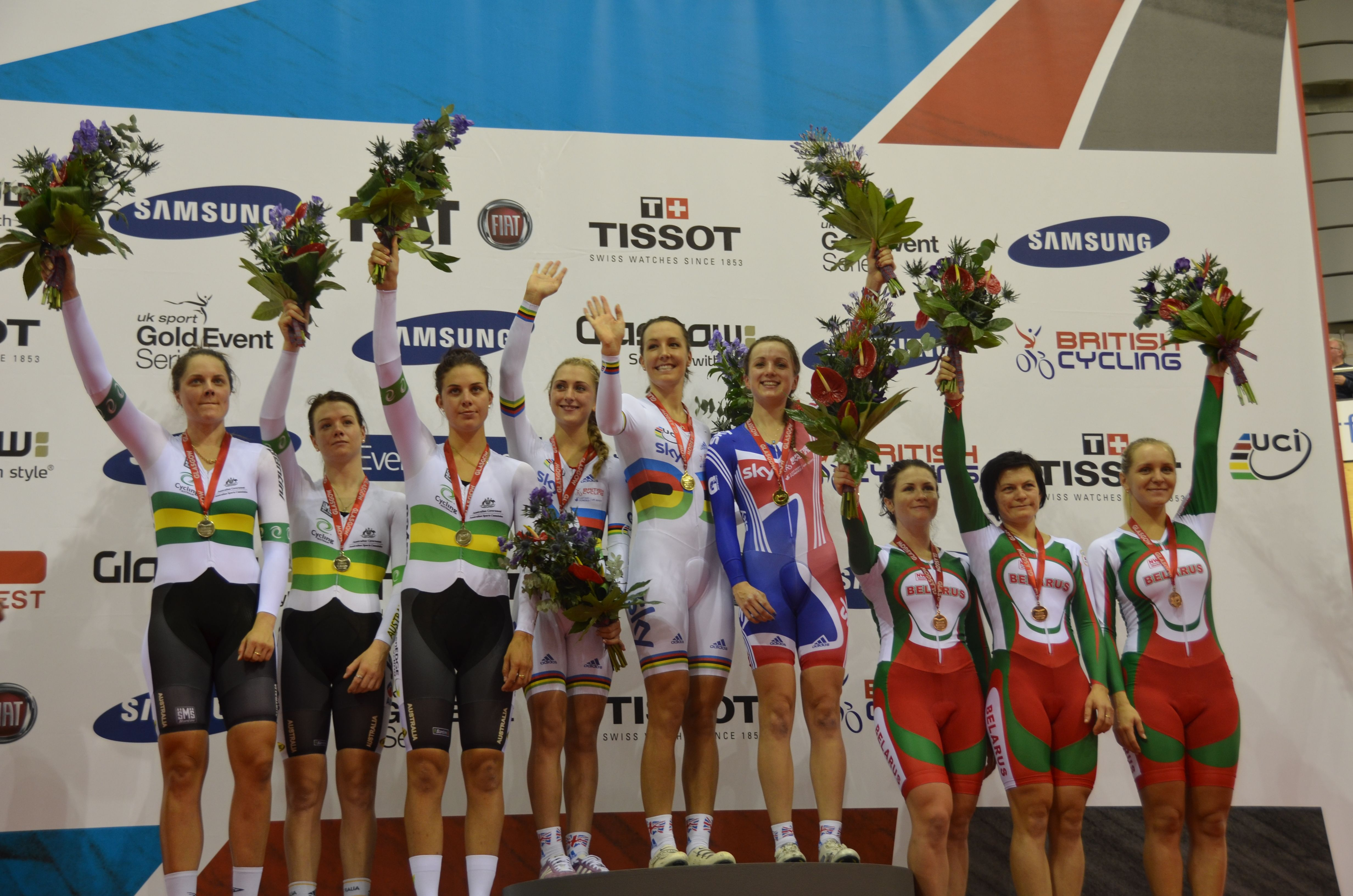 Podium Mannschaftsverfolgung Bahnrad-Weltcup 2012 in Glasgow, v.l.nr.: Ashlee Ankudinoff, Amy Cure, Melissa Hoskins, Laura Trott, Dani King, Elinor Barker, Aksana Papko, Tatjana Scharakowa, Alena Dylko